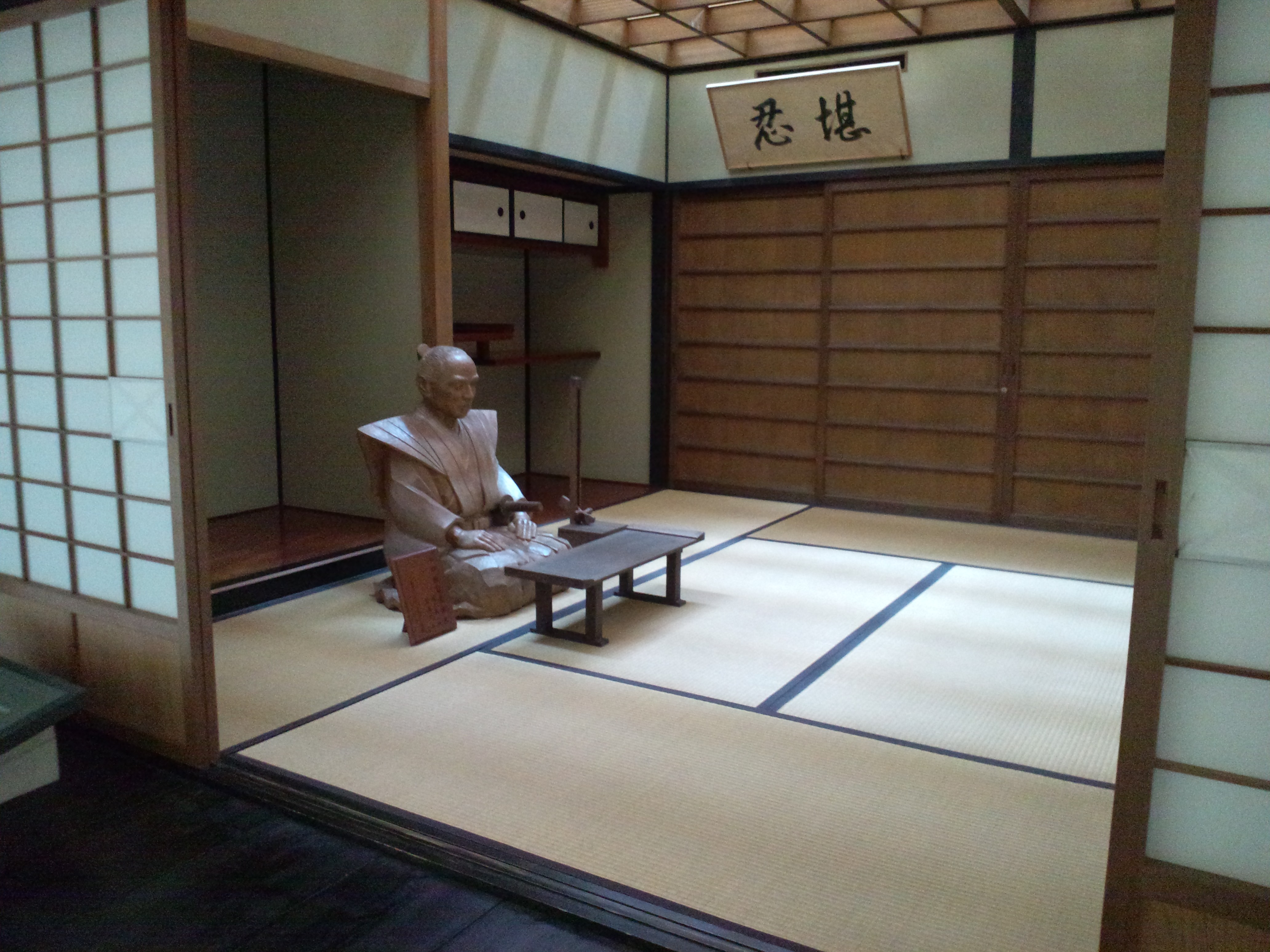 道の駅ガレリアかめおか 梅岩塾の模型